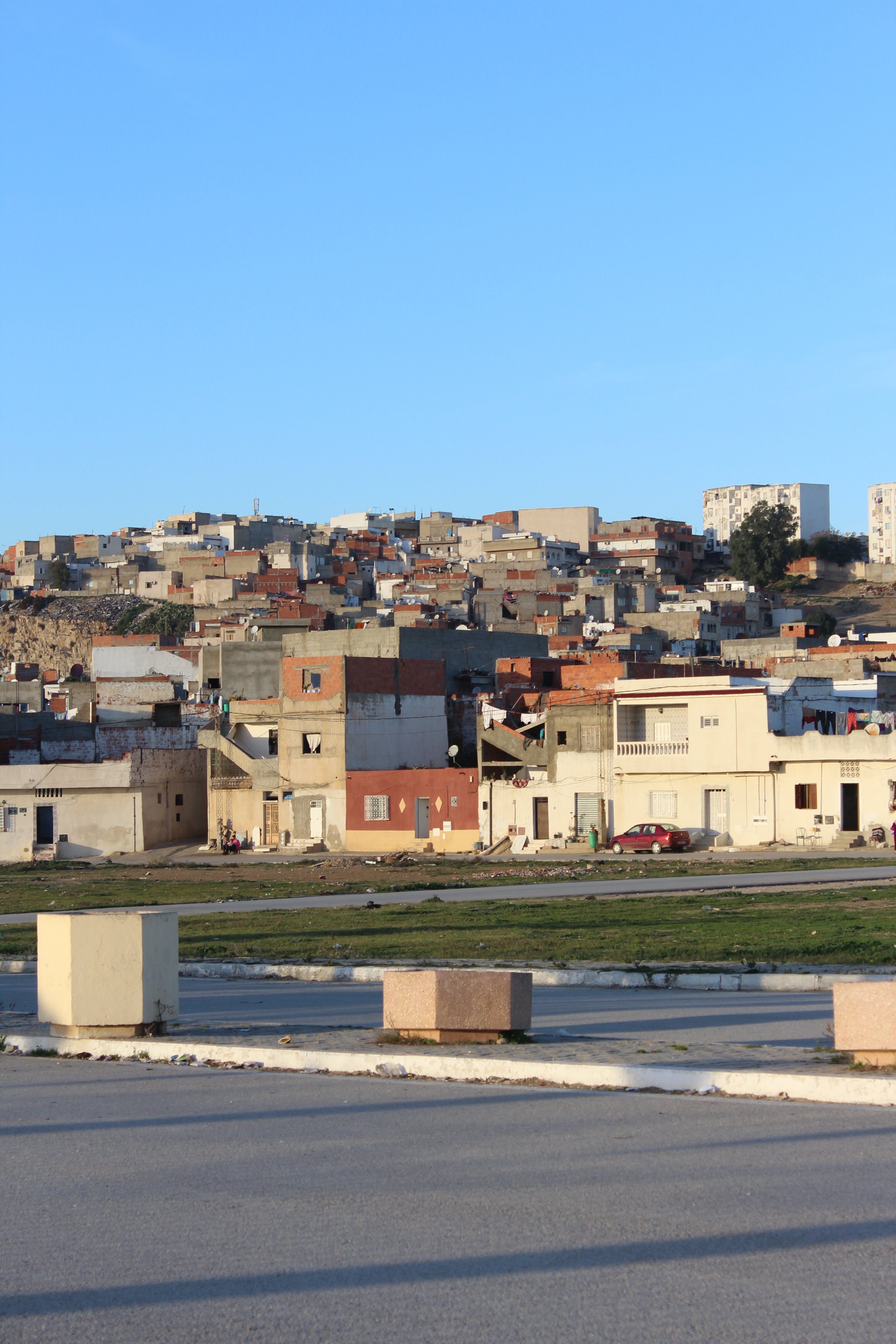 Sidi El Bechir, Tunis